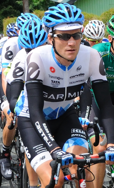 David Zabriskie - 7e étape du Tour de France 2011